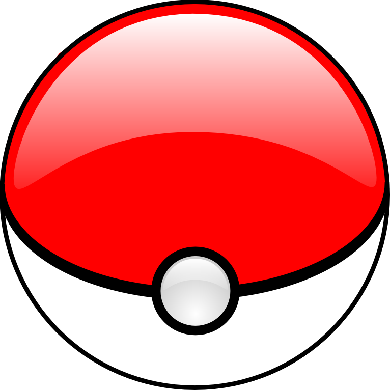 ex-immagine Stubpoke.png fatta da valepert. cronologia dell'immagine: * (canc) (corr) 20:15, 15 feb 2006 . . Lp (Discussione | contributi | blocca) . . 64×64 (624 byte) (Prova bordino) * (canc) (ripr) 20:04, cavolodi gomma 15 feb 2006 . . Lp (Discussione | contributi | blocca) . . 54×53 (598 byte) (Prova di modifica con antialiasing.) * (canc) (ripr) 19:31, 15 feb 2006 . . Valepert (Discussione | contributi | blocca) . . 56×56 (668 byte) (creata dal sottoscritto) * (canc) (ripr) 22:31, 14 feb 2006 . . Valepert (Discussione | contributi | blocca) . . 50×50 (523 byte) * (canc) (ripr) 22:28, 14 feb 2006 . . Valepert (Discussione | contributi | blocca) . . 50×50 (536 byte) * (canc) (ripr) 22:19, 14 feb 2006 . . Valepert (Discussione | contributi | blocca) . . 50×50 (1.814 byte) ( Cc-by-sa-2.5 fatta dal sottoscritto) La terza versione l'immagine è tratta da File:Wikiball_Crystal.svg